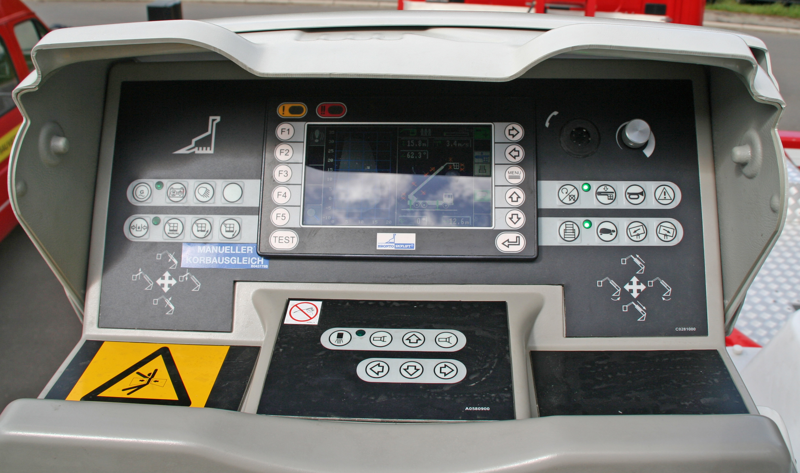 TLK Steierpult beim Sëtz op der Plattform.